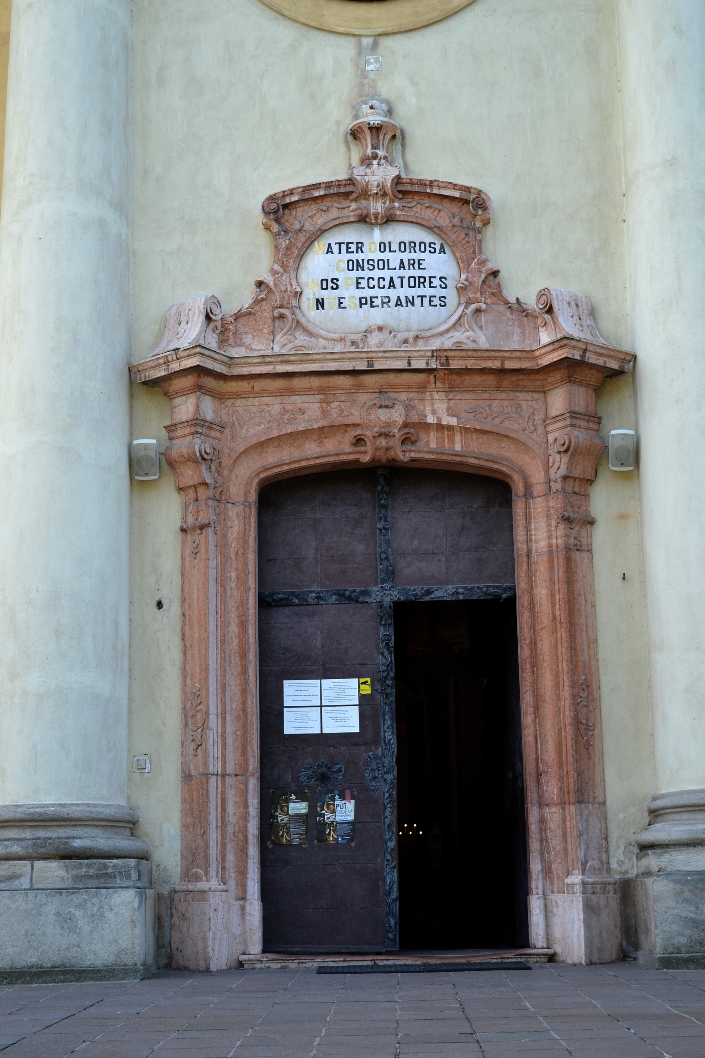 Šaštín-Stráže (okr. Senica), Bazilika Sedembolestnej Panny Márie; hlavný portál baziliky